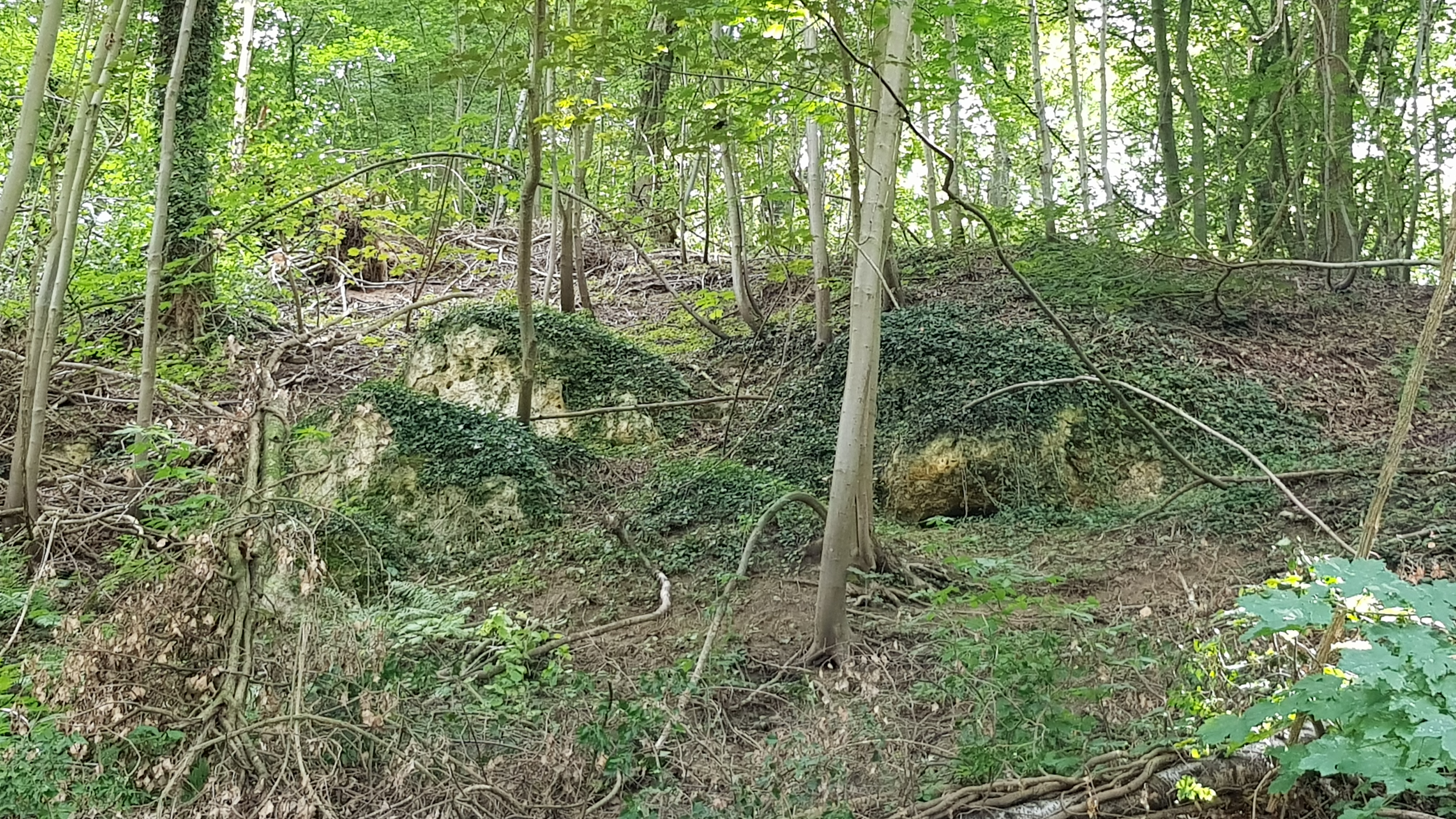 Groeve het Paradijsbergske IIa, Geulhem, Nederland